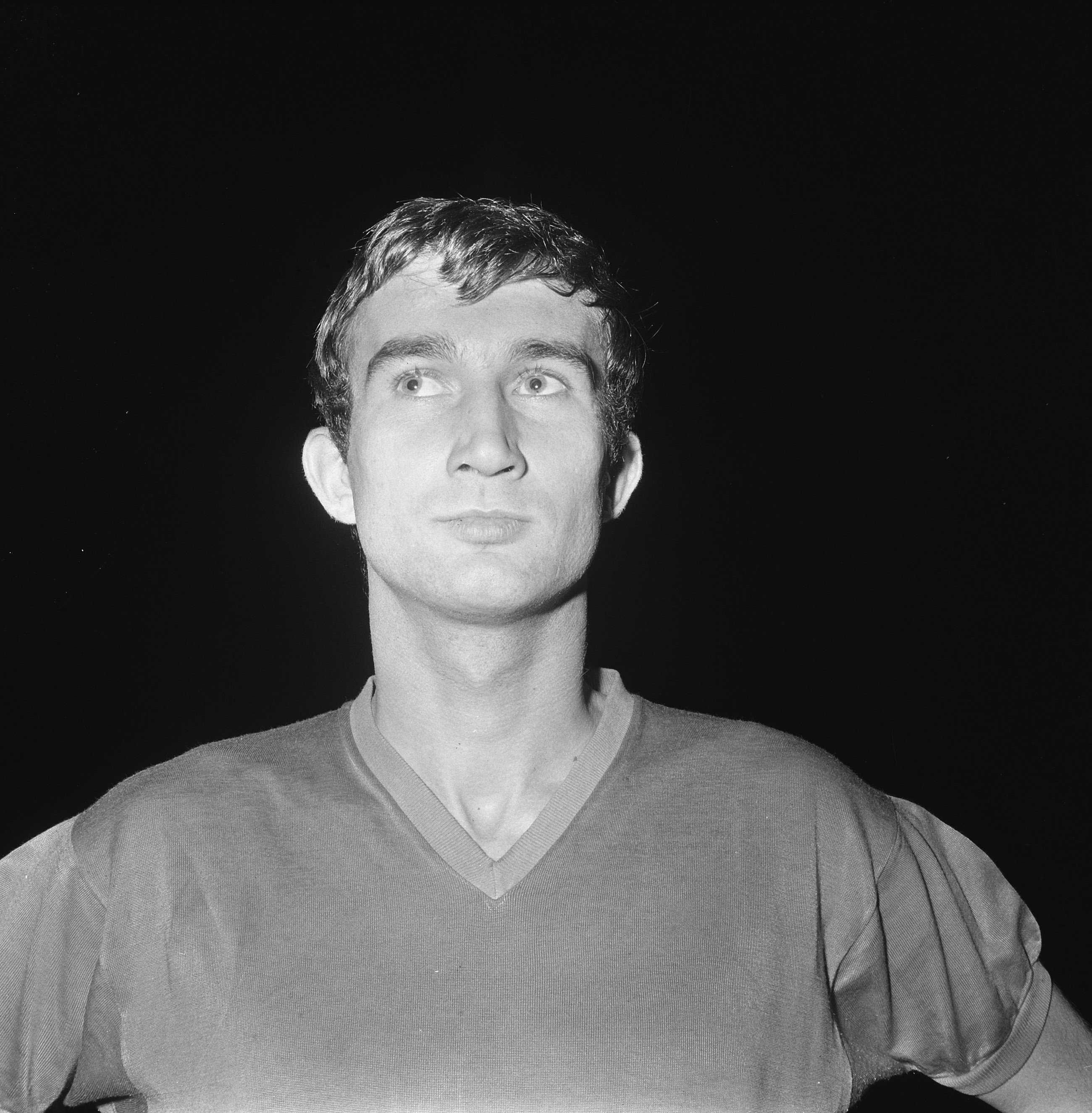 Collectie / Archief : Fotocollectie Anefo Reportage / Serie : [ onbekend ] Beschrijving : Spelers Standaard Luik , Roger Claessen (kop) Datum : 16 september 1965 Trefwoorden : SPELERS, sport, voetbal Instellingsnaam : Standard Luik Fotograaf : Nijs, Jac. de / Anefo Auteursrechthebbende : Nationaal Archief Materiaalsoort : Negatief (zwart/wit) Nummer archiefinventaris : bekijk toegang 2.24.01.03 Bestanddeelnummer : 918-1940